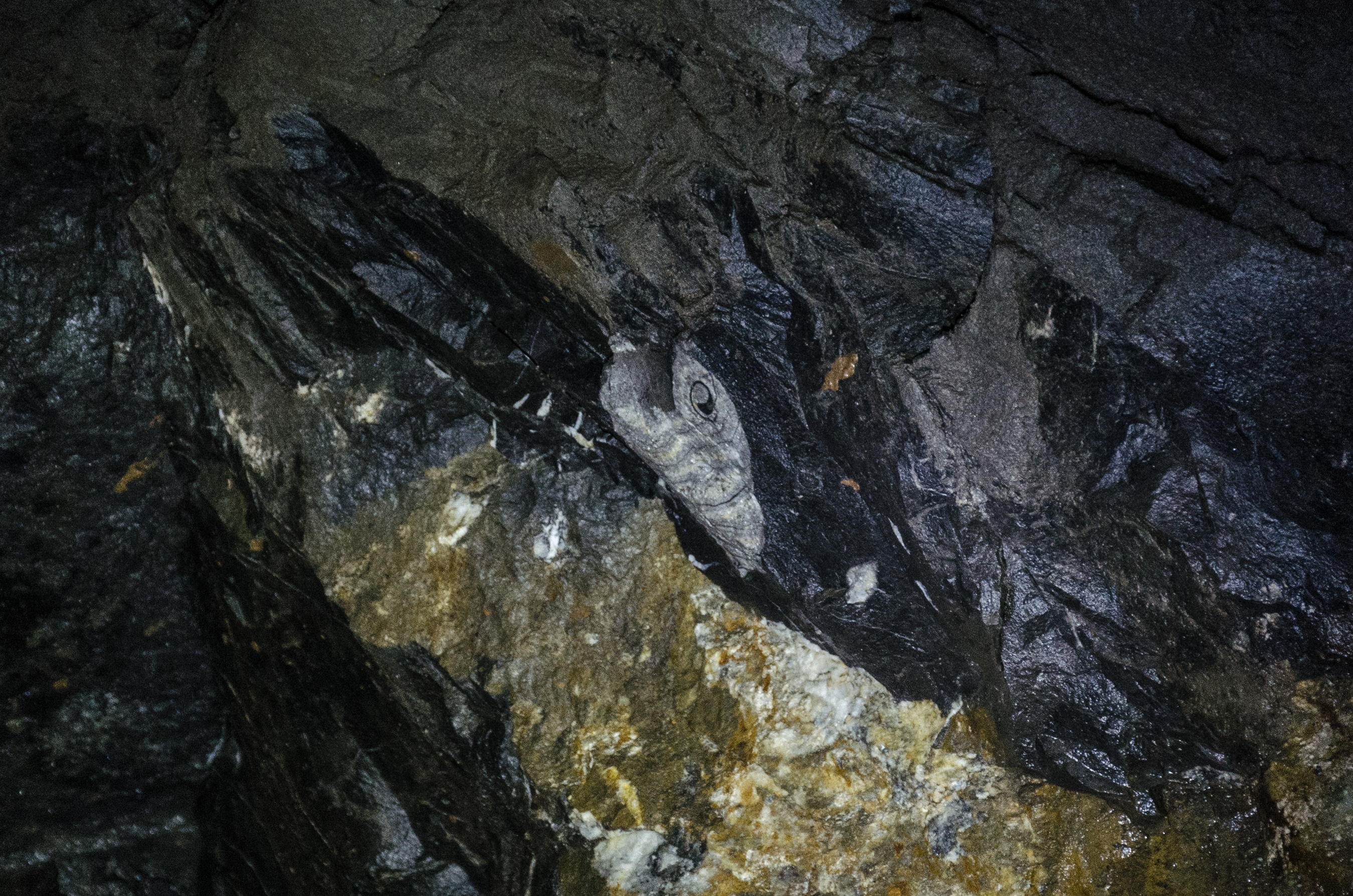 Gut erkennbare Fossilien im Hardstollen (Wuppertal)